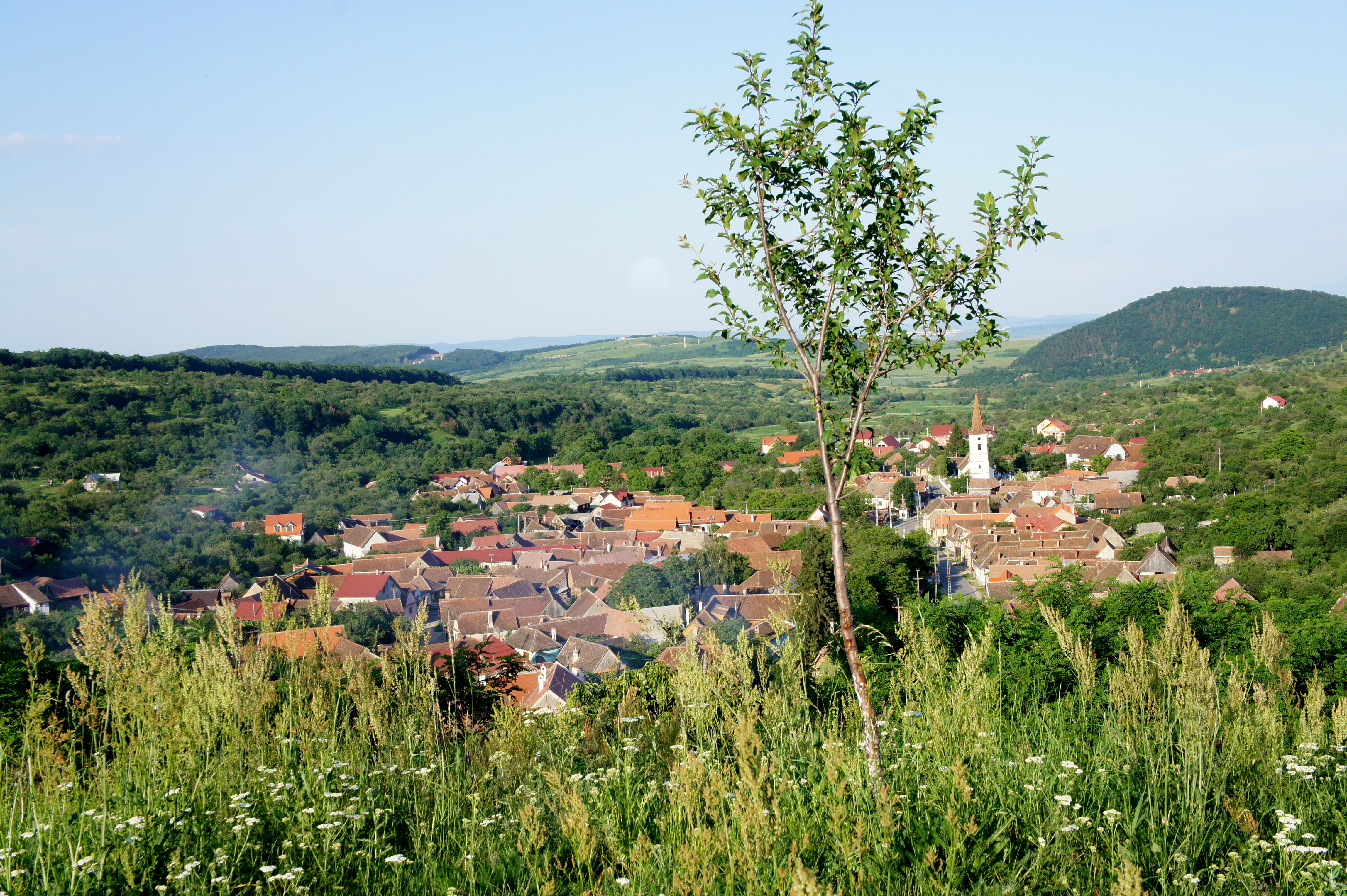 vue d'en haut